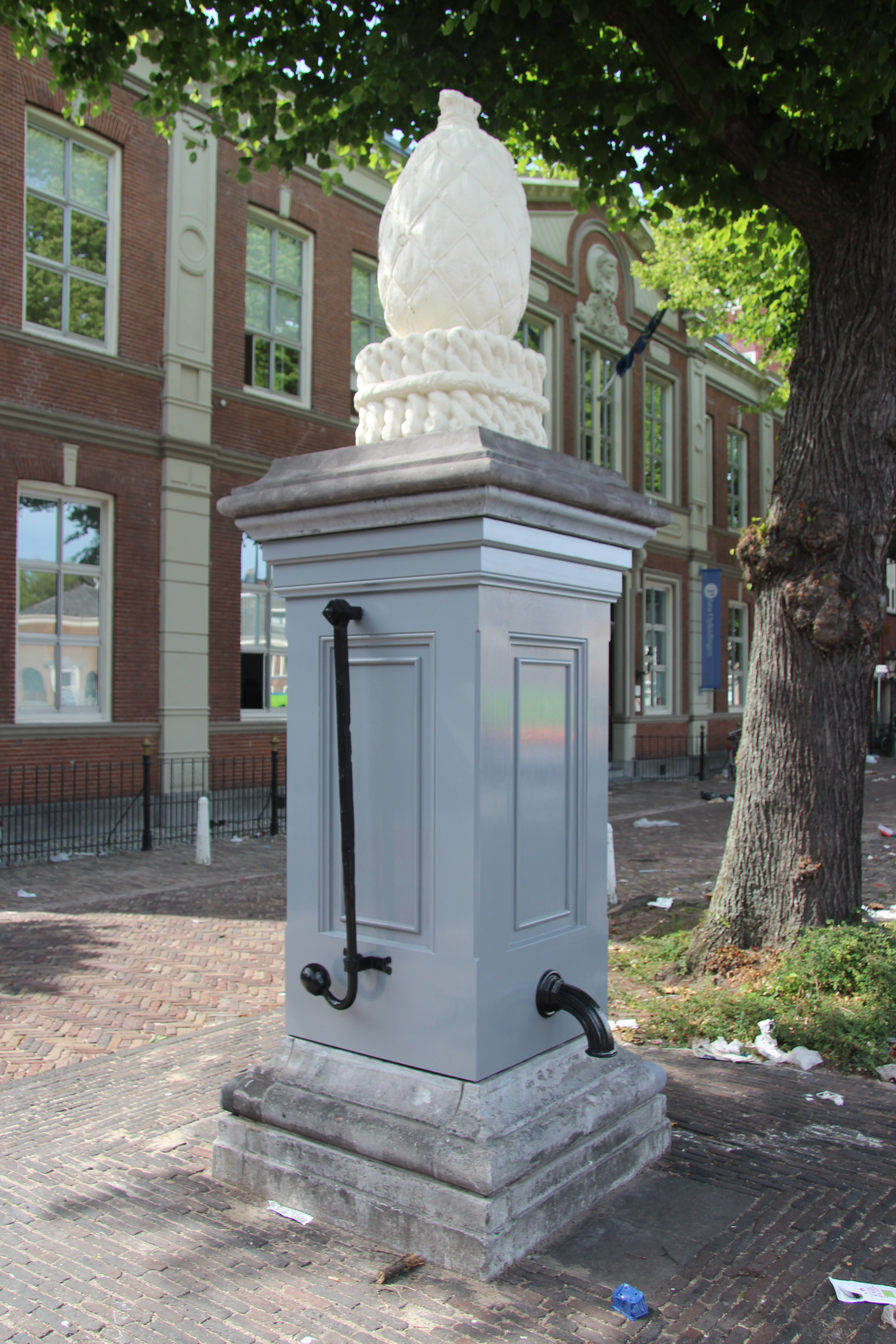 De pomp op de Garenmarkt in Leiden na de renovatie van 2015.